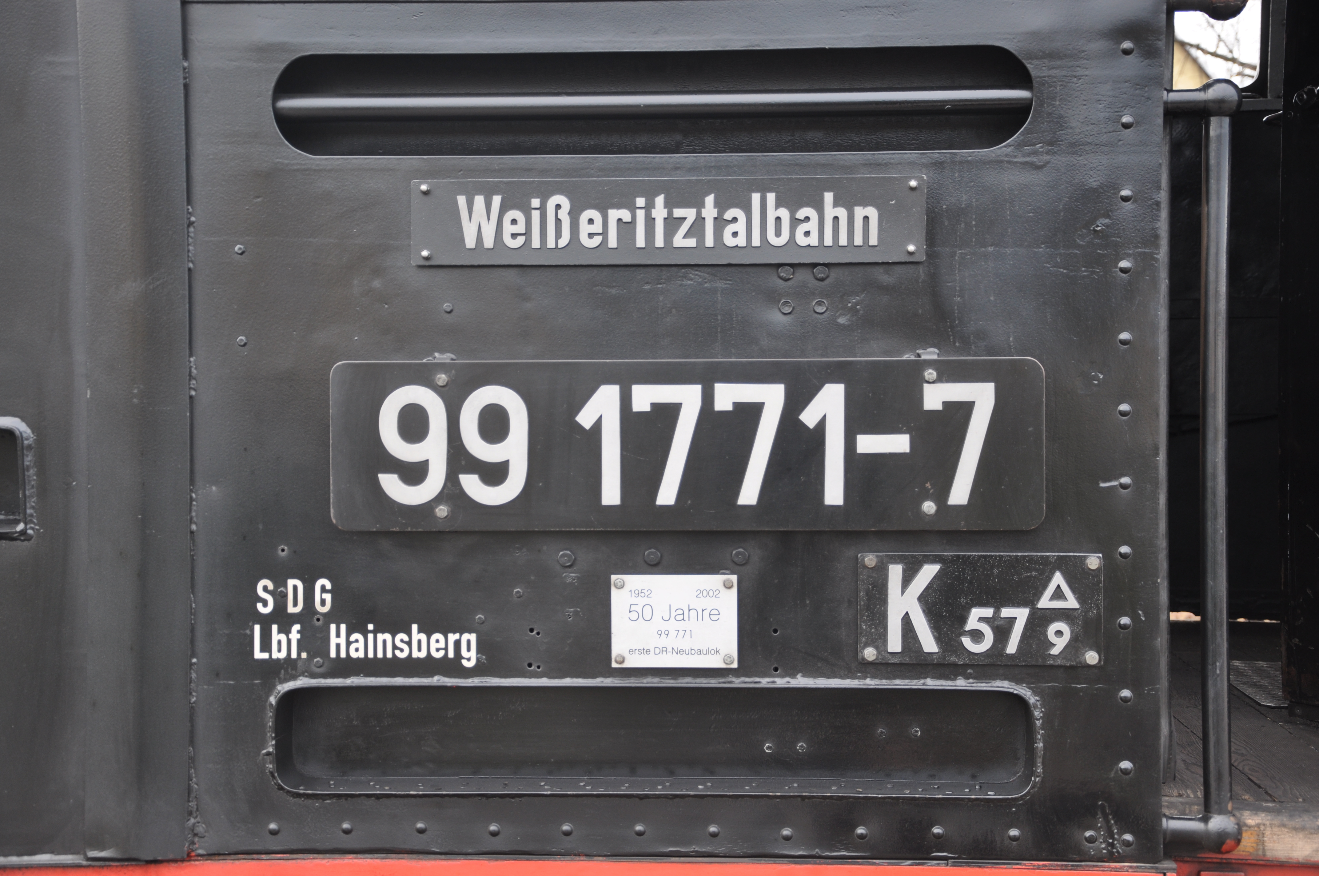 Schildersatz an der Dampflokomotive 99 1771 (Bahnhof Dippeoldiswalde)